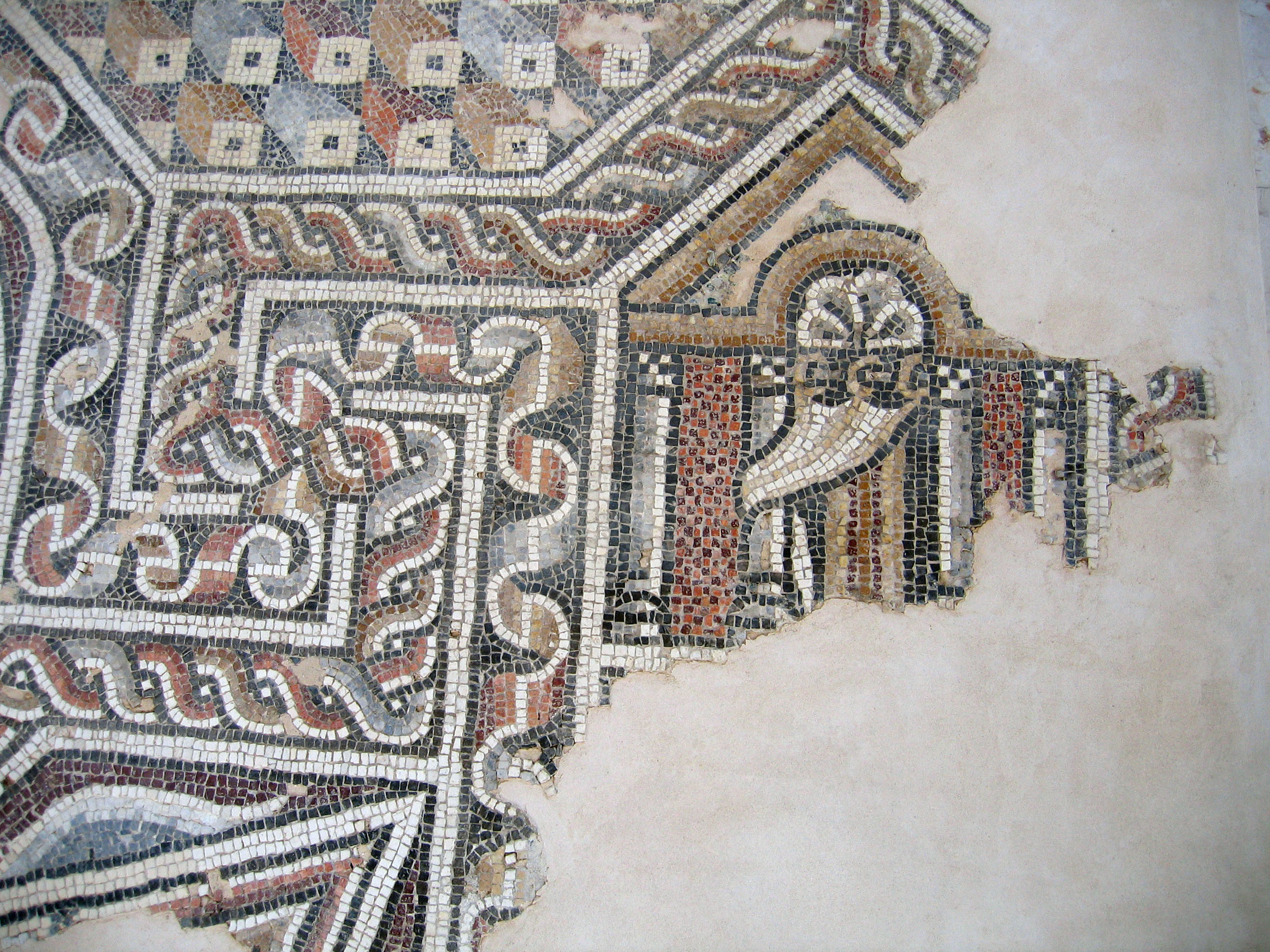 בית הכנסת השומרוני בח'רבת סמארה